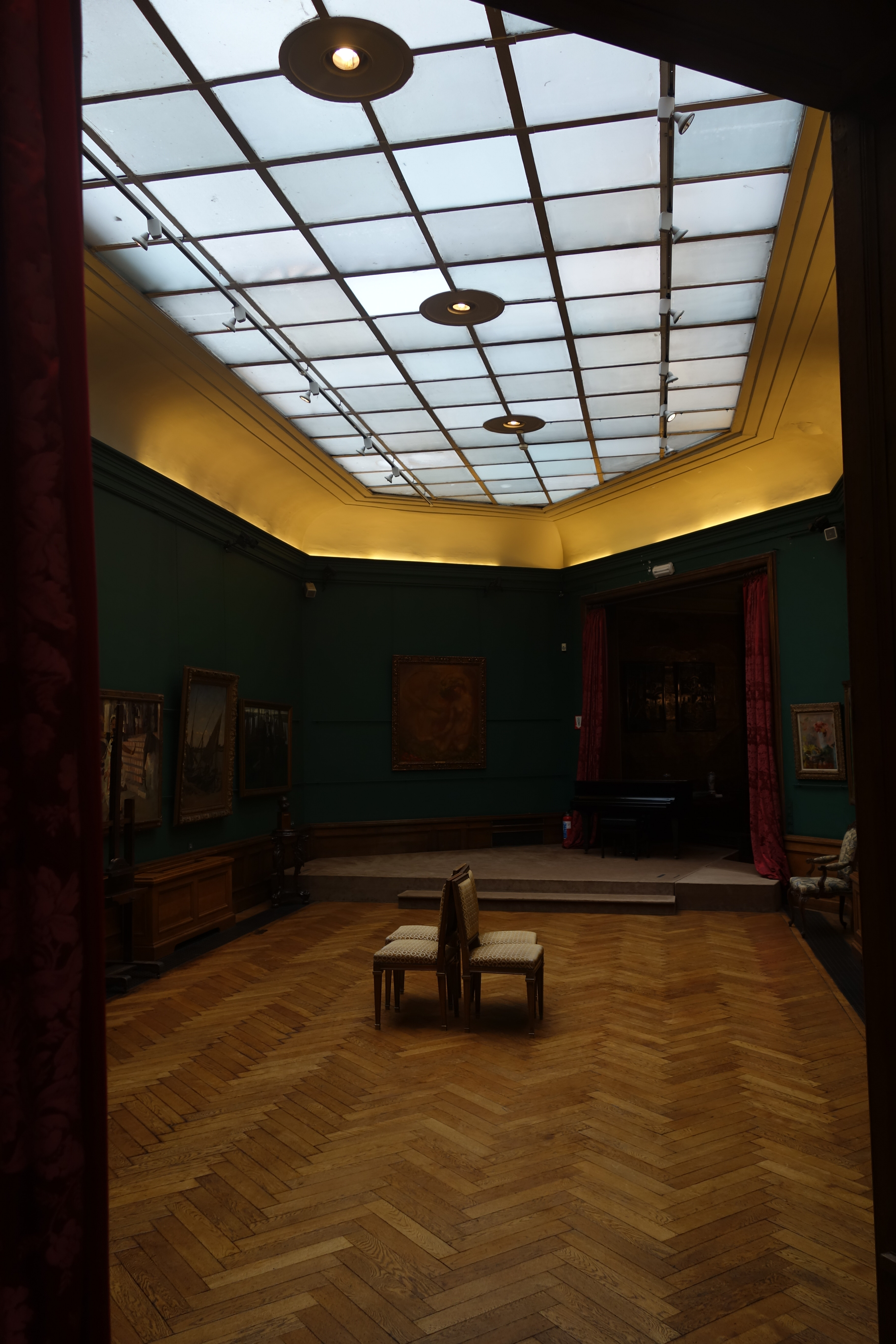 Charlier Museum